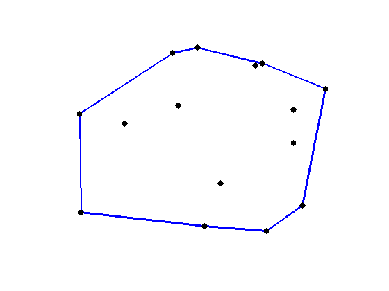 Polígono convexo que encierra un conjunto de puntos.